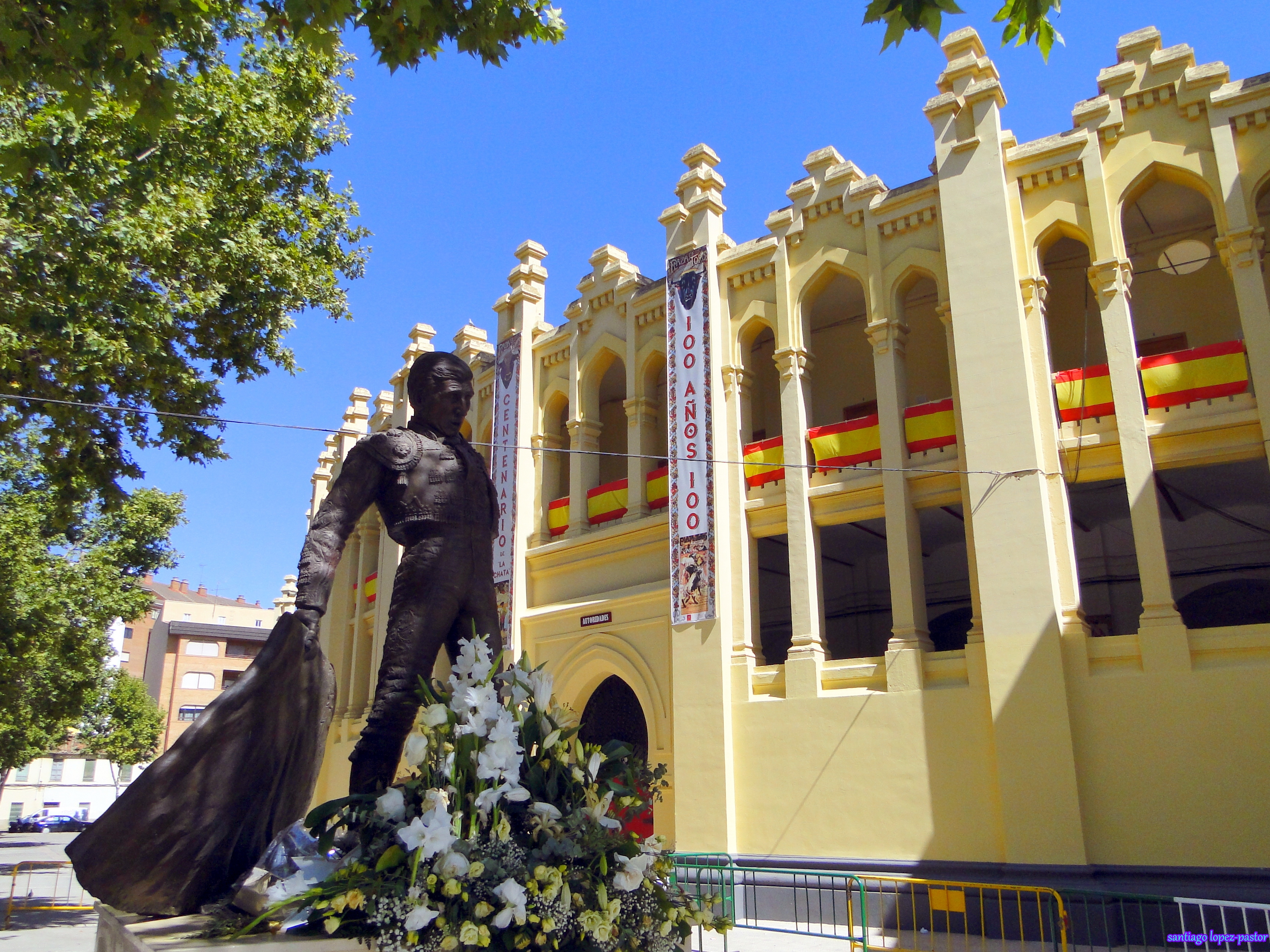 Monumento a Dámaso González. Plaza de toros de Albacete